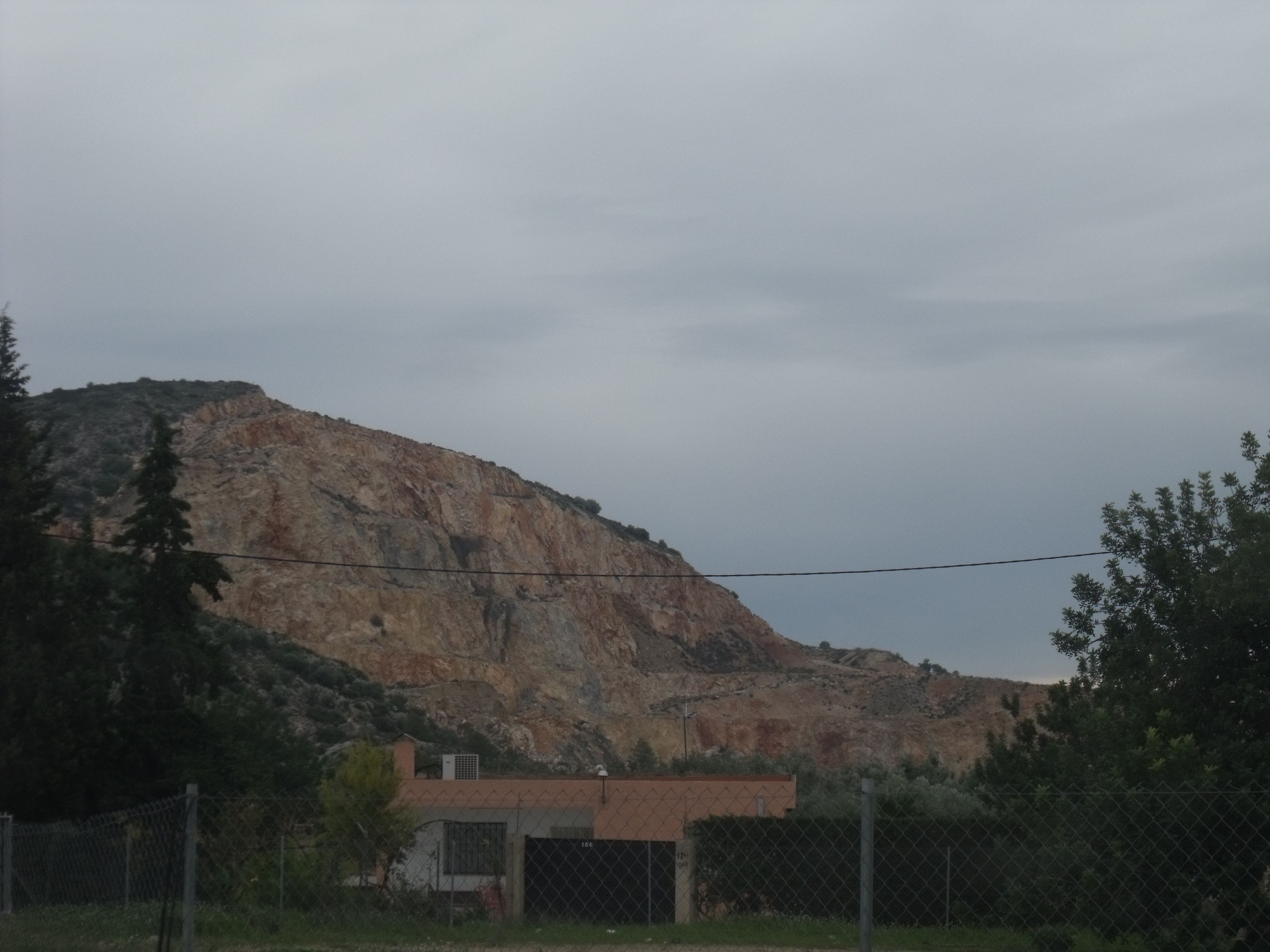 Sierra Perenchiza vista desde el sur. Cantera que se utilizó en el Plan Sur.